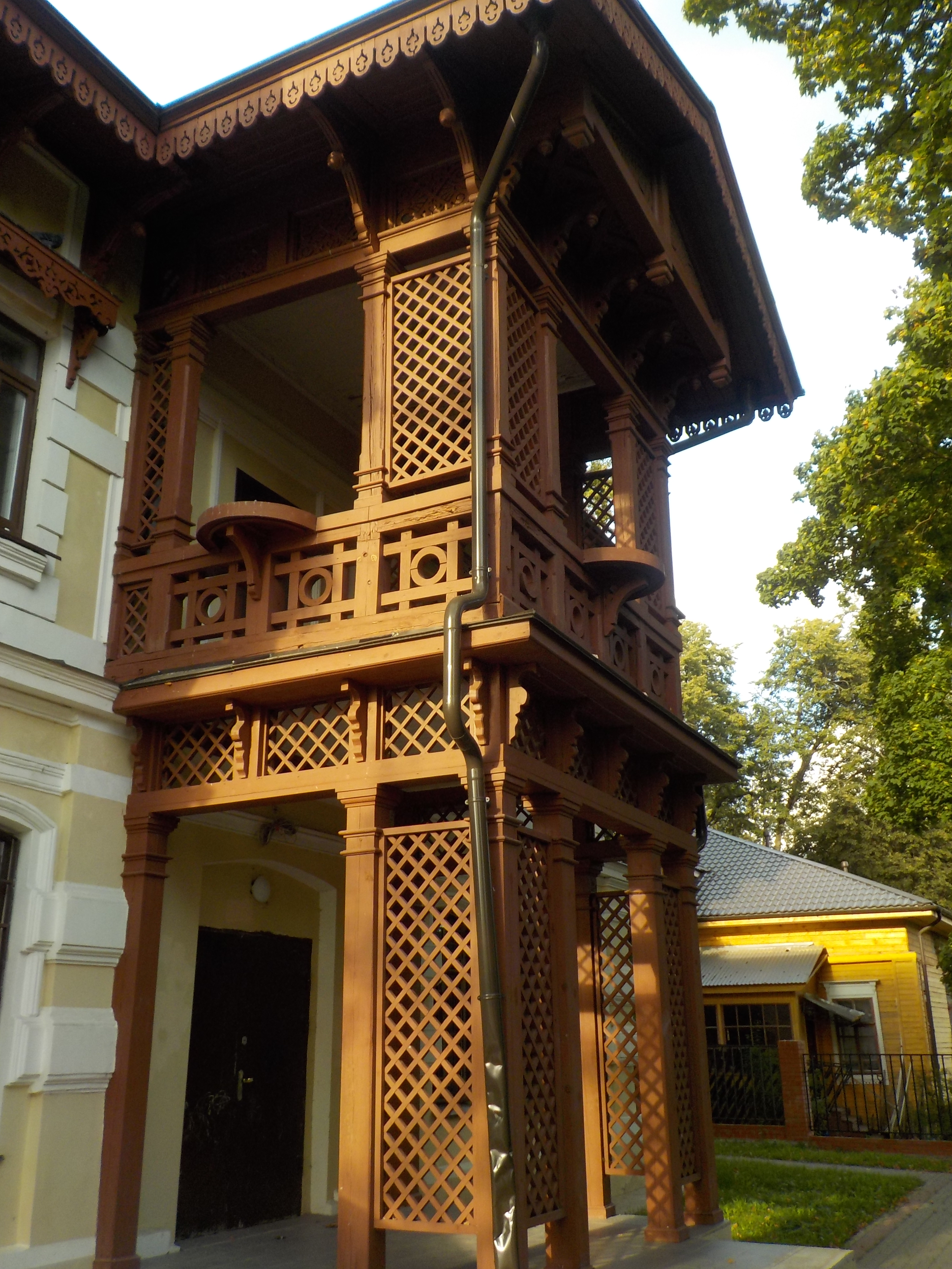 Главный дом: Щапово, Троицкий округ, Москва